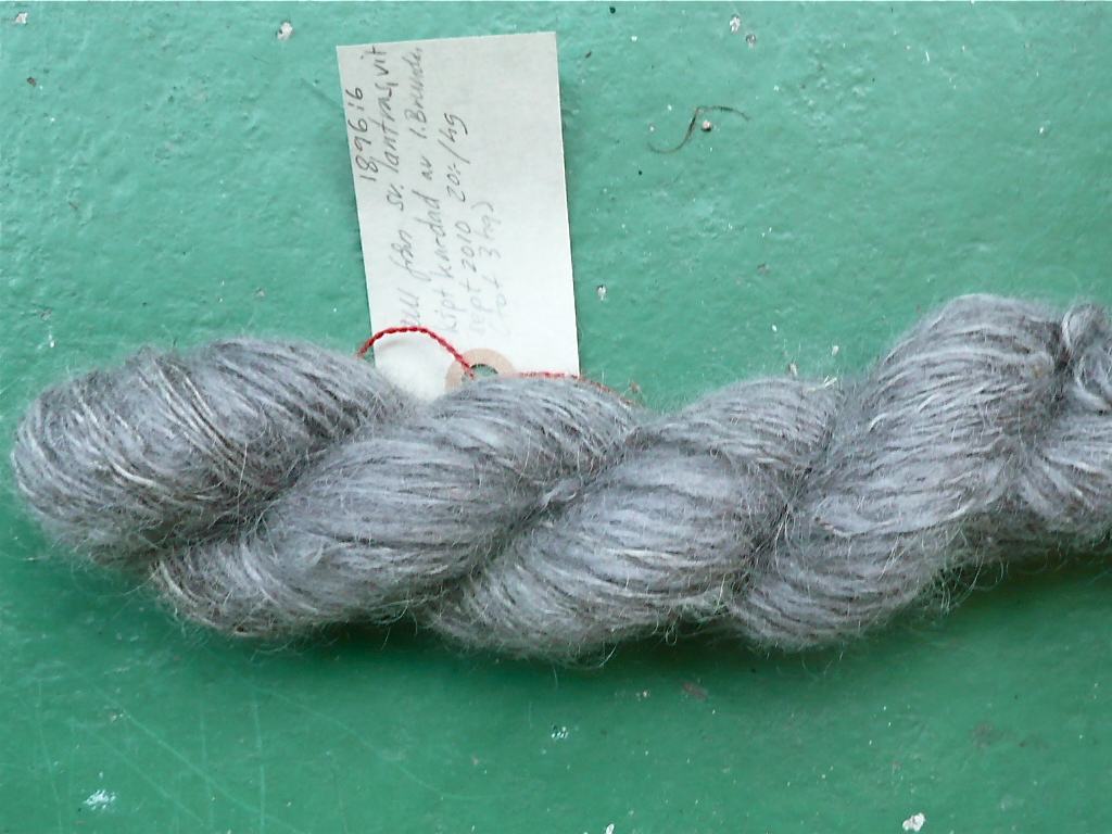 Sammetsfotad pluggskivling / paxíllus atrotomentósus Bad I Alun-betad 2-tr handspun